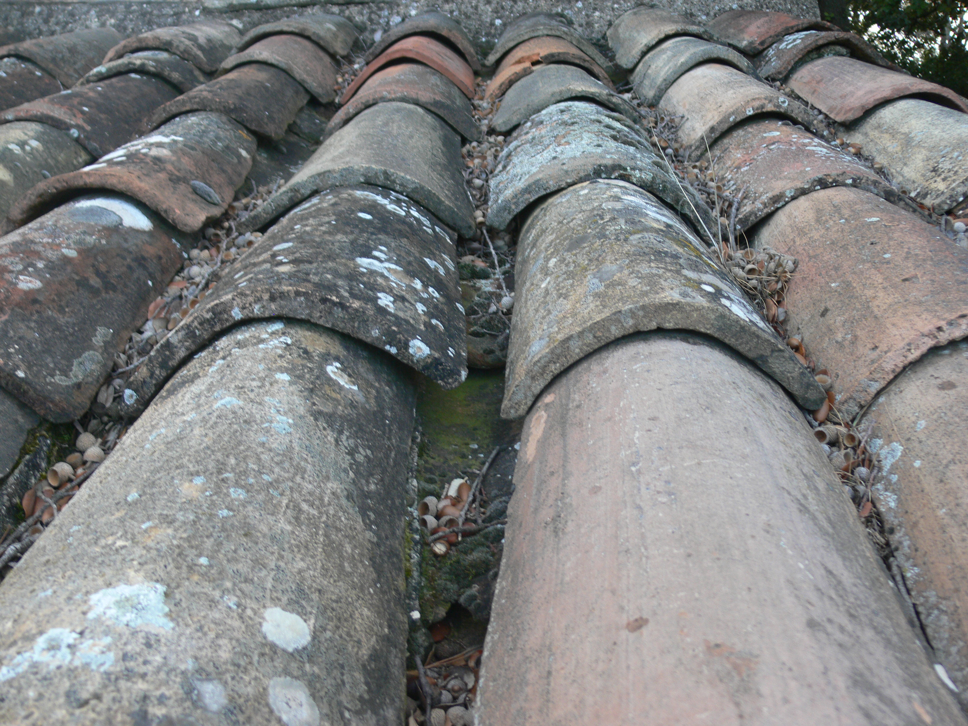 Domaine des Treilles (Inscrit) .